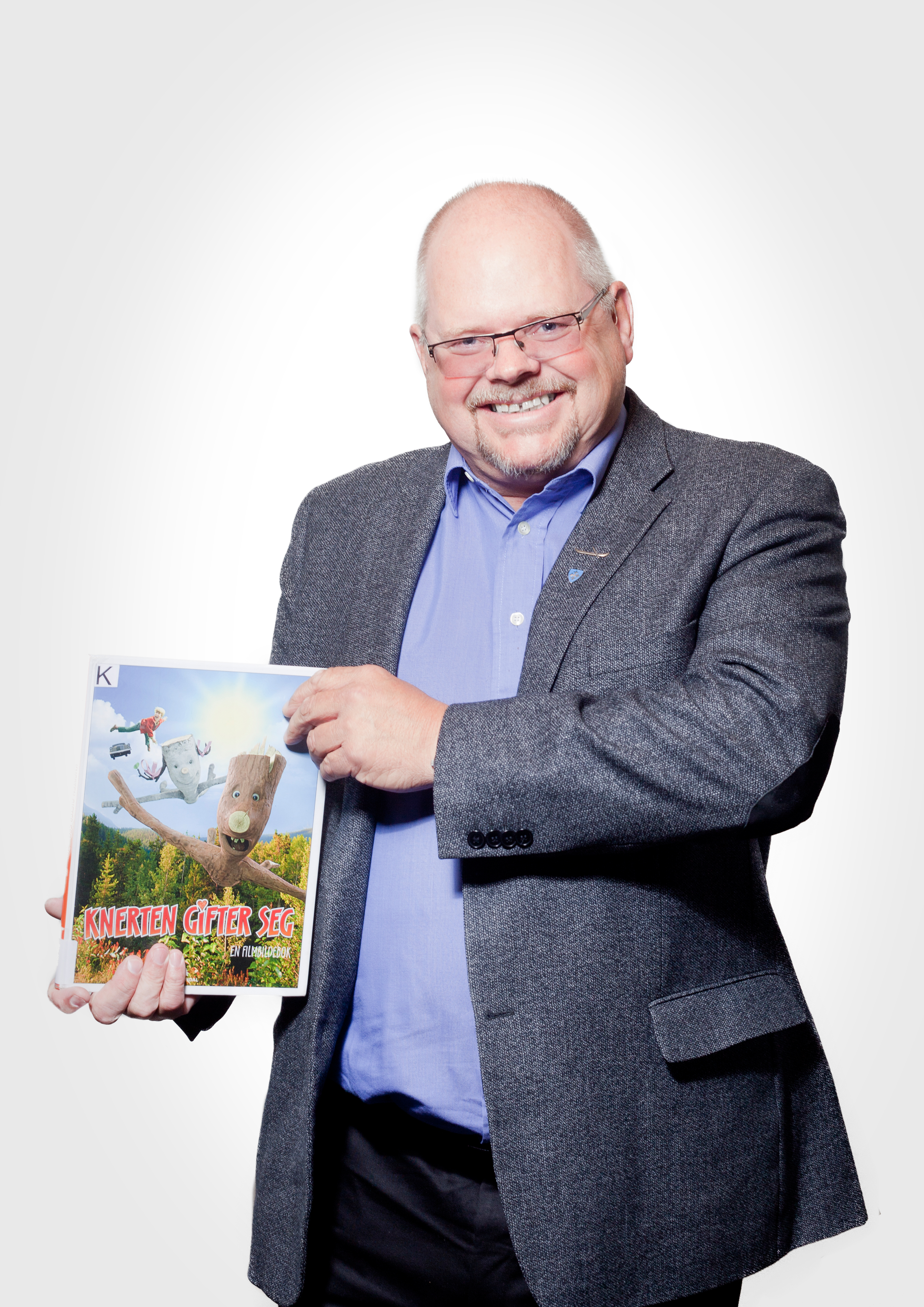 Ordfører Arnt Mickelsen fra Røyrvik, Nord-Trøndelag. Bildet er tatt i forbindelse med Nord-Trøndelag fylkesbiblioteks kampanje "Leseambassadører"